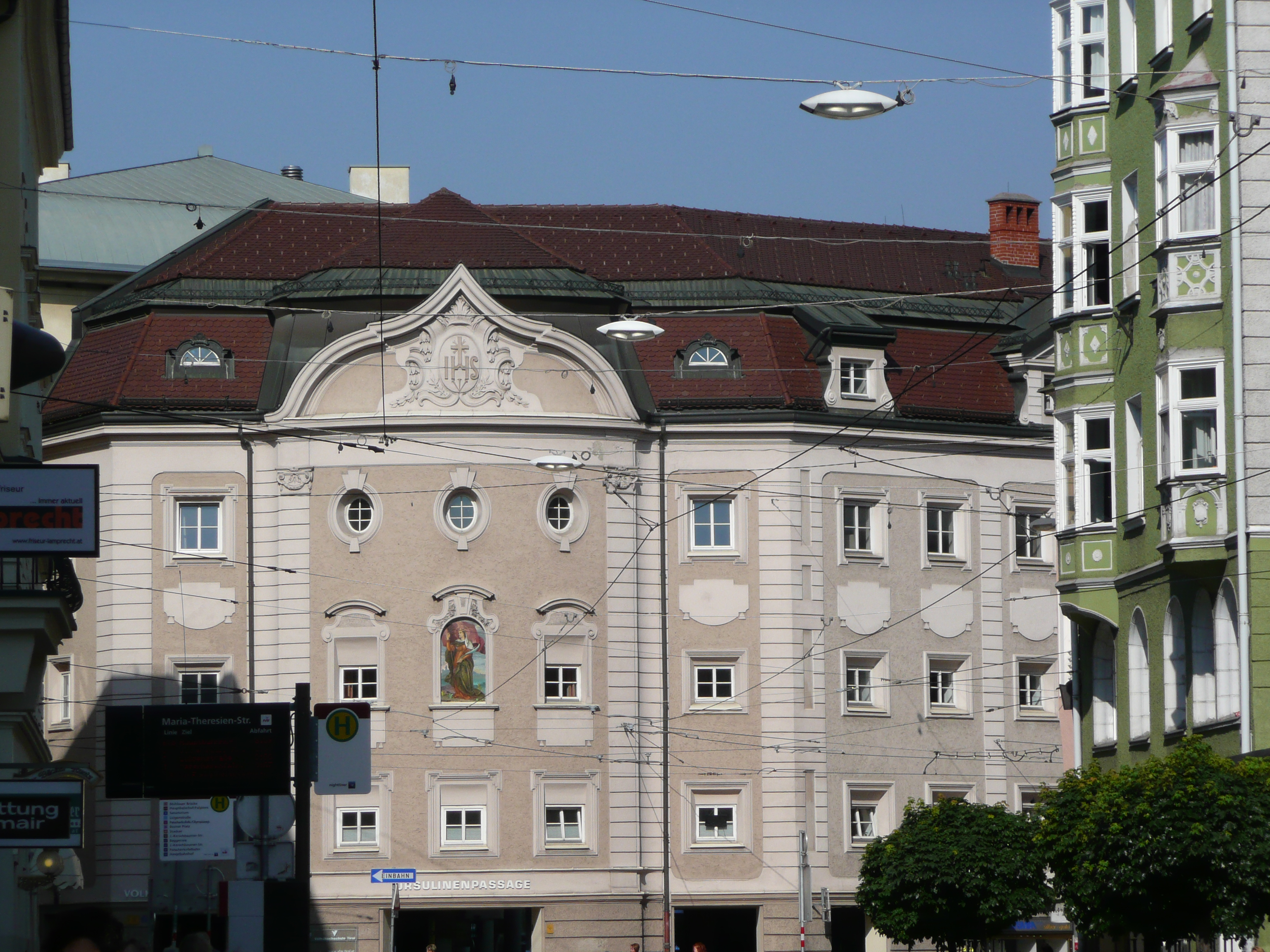 ehemaliges Ursulinenkloster, Marktgraben, Innsbruck This media shows the remarkable cultural object in the Austrian state of Tyrol listed by the Tyrolean Art Cadastre with the ID 118270. (on tirisMaps, on tirisdienste.at, pdf, more images on Commons)